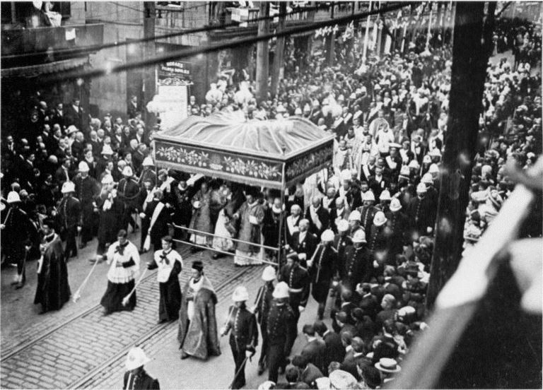 La procession dans les rues de Montréal à la clôture du Congrès eucharistique de 1910 était tellement importante qu'elle dura plus de quatre heures. Elle se termina au terrain Fletcher (aujourd'hui le parc Jeanne-Mance) où une foule d'un demi million de pèlerins s'était rassemblée pour la bénédiction.